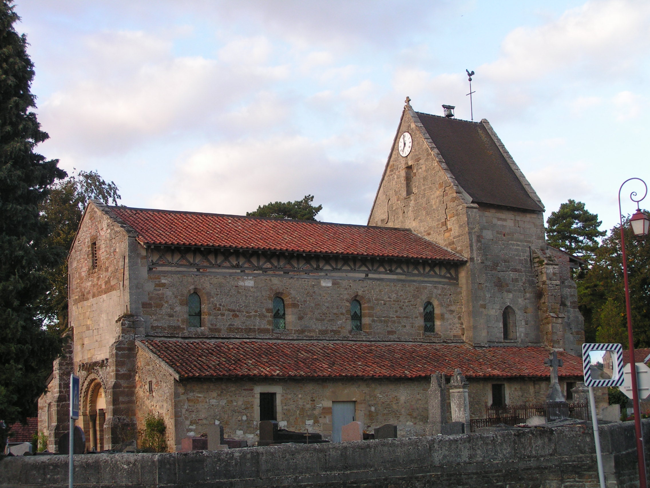 Église Saint-Martin de Favresse (Classé) .